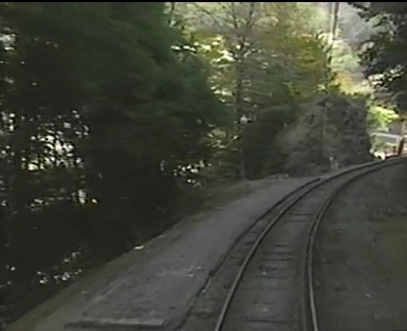 旧線時代の大加島仮乗降場【全体】 H2年撮影。